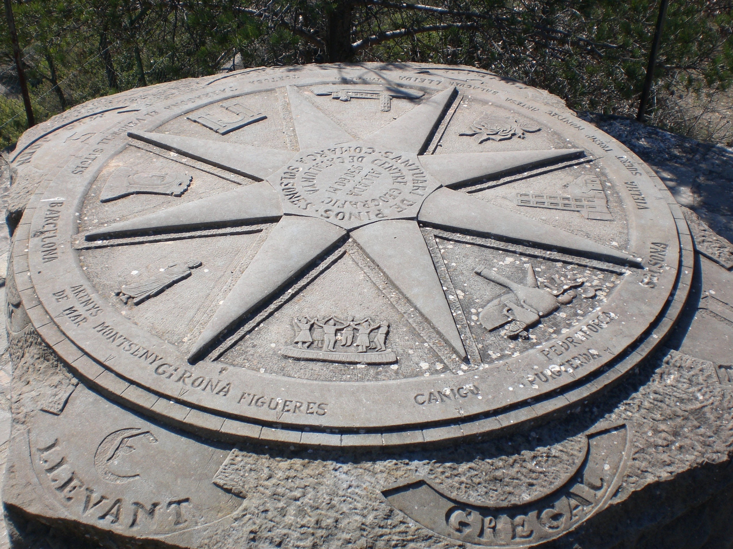 Centre geogràfic de Catalunya, Pinós (març 2008)